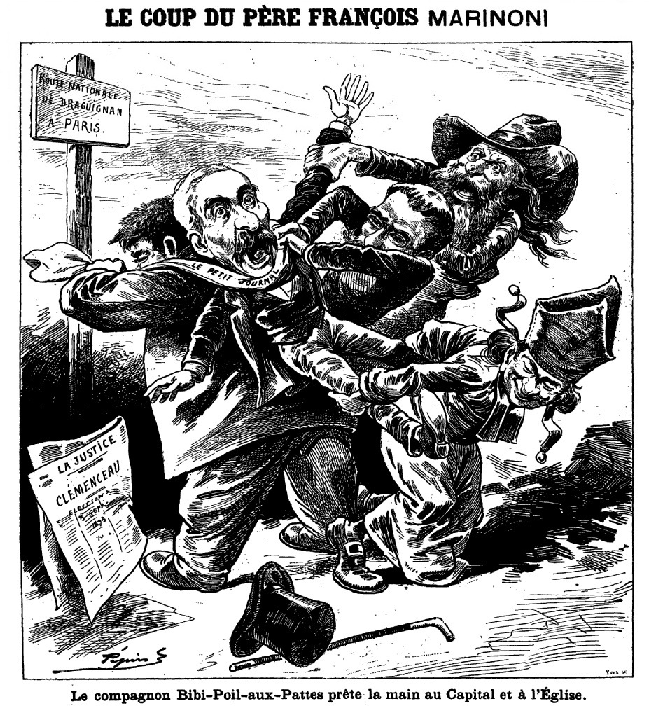 "Le coup du père François Marinoni. - Le compagnon Bibi-Poil-aux-Pattes prête la main au Capital et à l’Église".